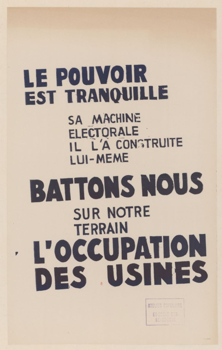 Le pouvoir est tranquille, sa machine électorale il l'a construite lui-même. Battons nous sur notre terrain l'occupation des usines. Atelier populaire ex-Ecole des Beaux-Arts. Affiche Mai 1968.